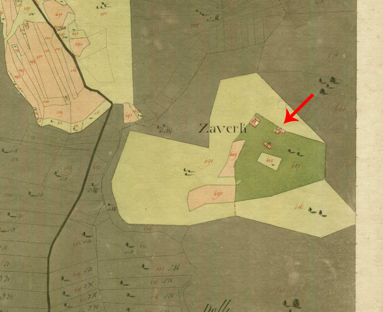 Franciscejski kataster za Kranjsko, 1823-1869